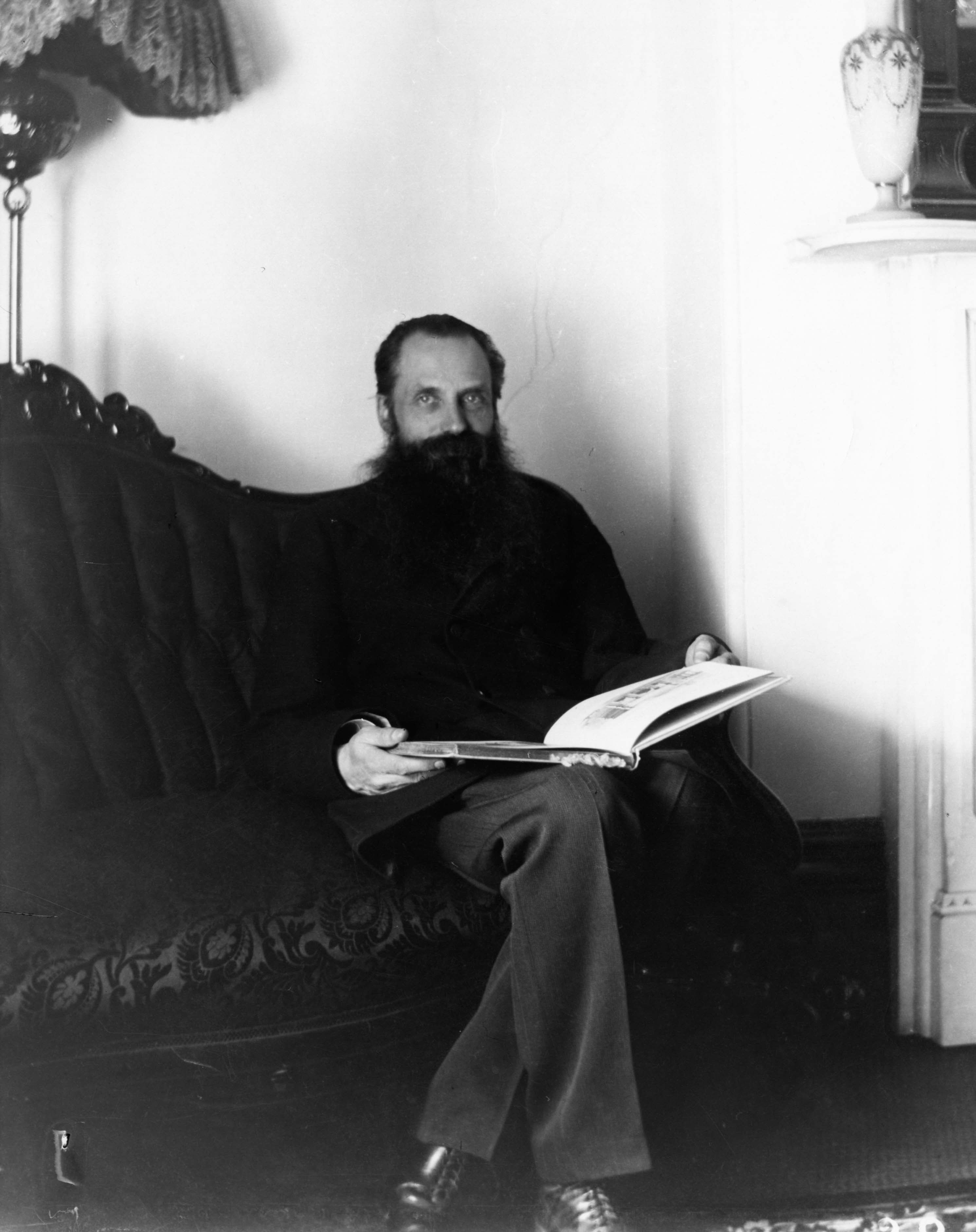 Portrait photographique de Guillaume Couture